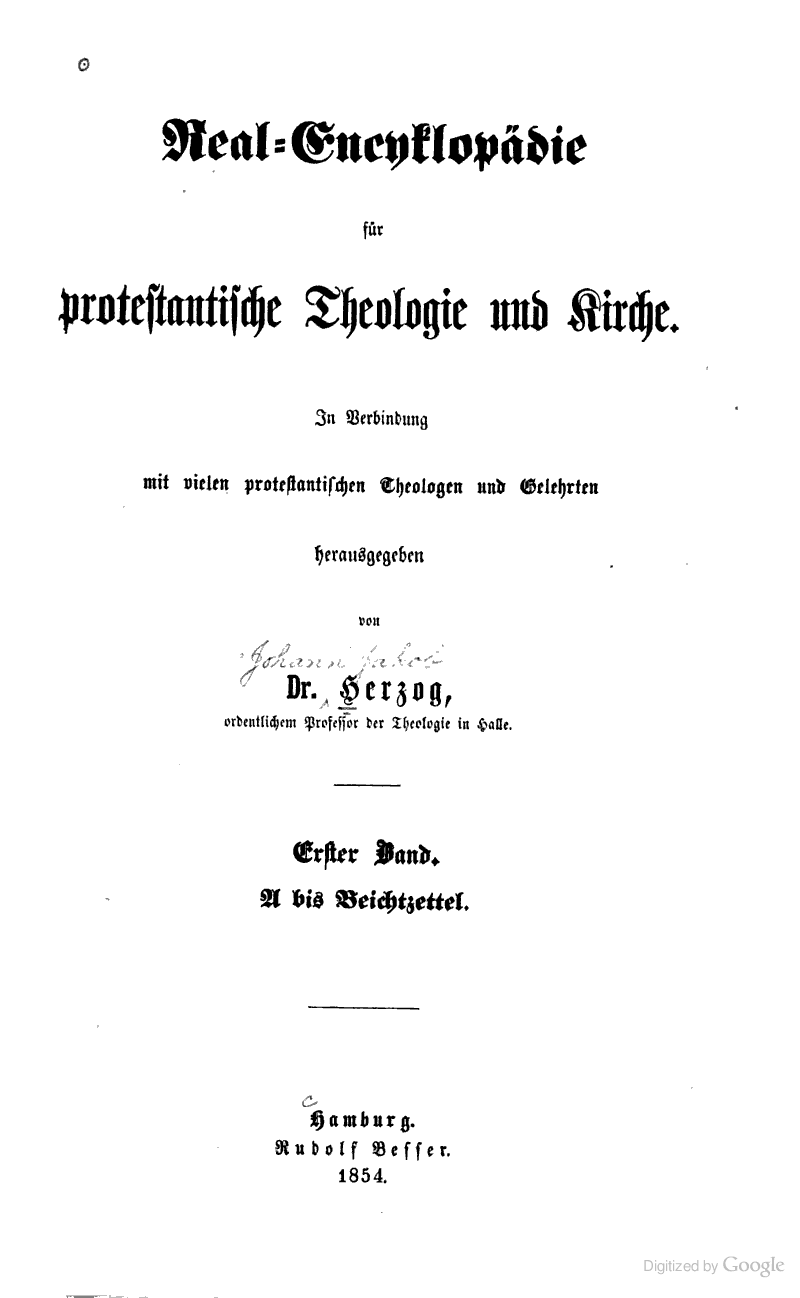 Realenzyklopädie für protestantische Theologie und Kirche, 1. Auflage, 1. Band, Seite I